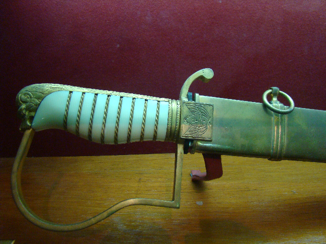 Replica sable Brown (Museo de Armas de la Nación)